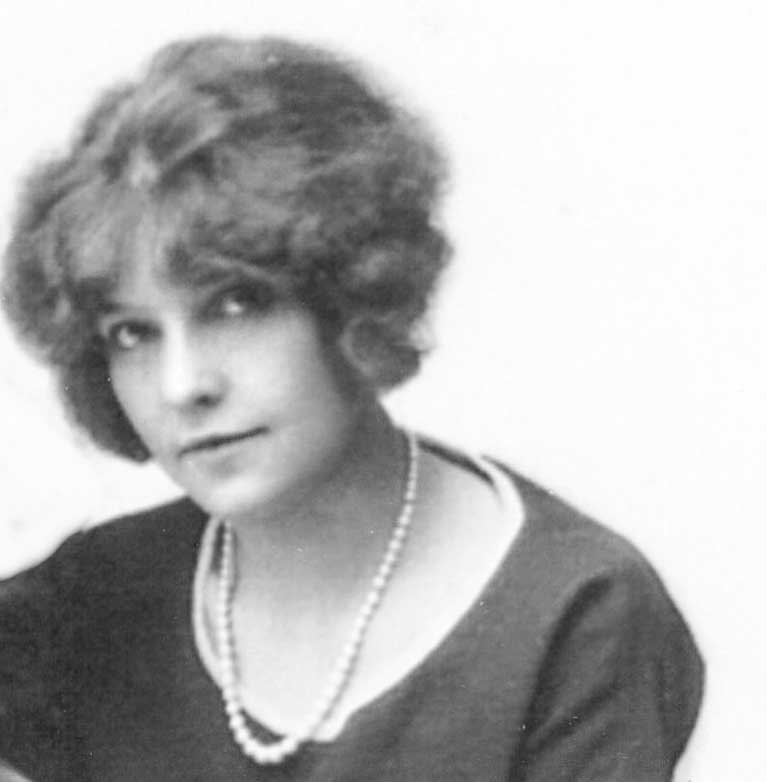 Portrait de Suzanne Lang-Willar (photographiée en 1922)